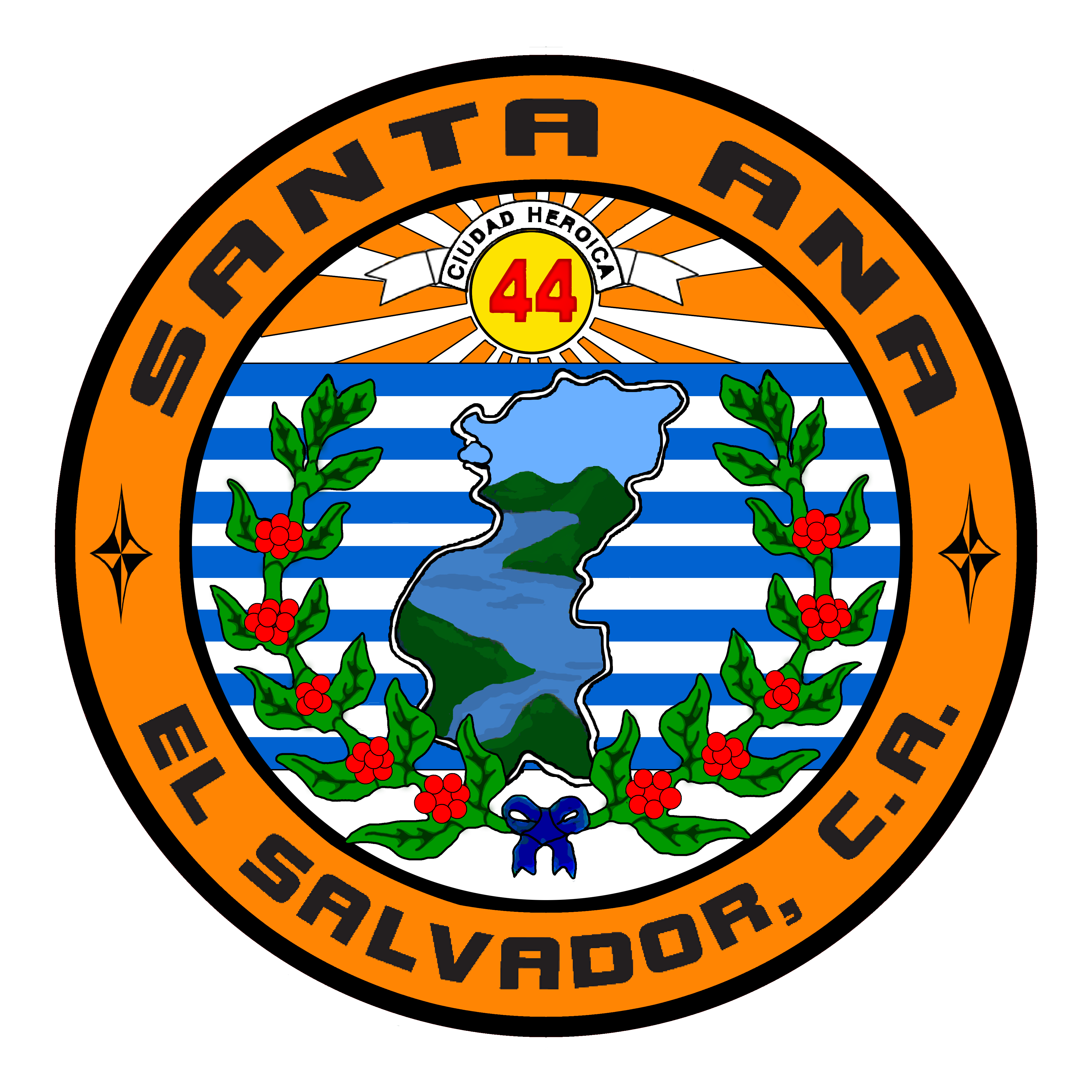 El Escudo de Santa Ana, El Salvador